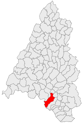 Categorie:Hărţi ale judeţului Bihor